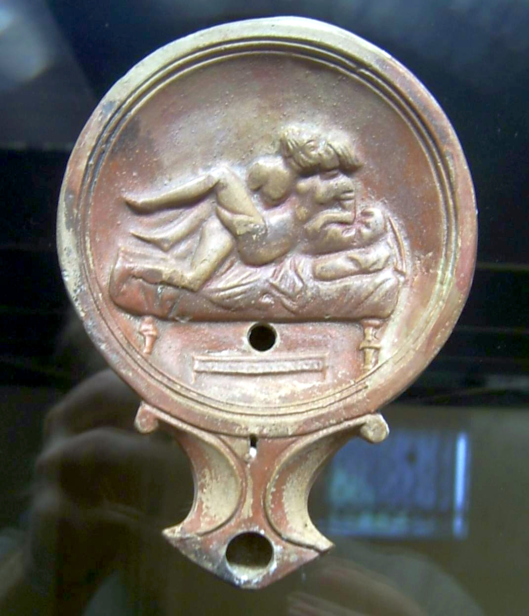 Öllampe mit erotischem Motiv im Römisch-Germanischen Museum Köln